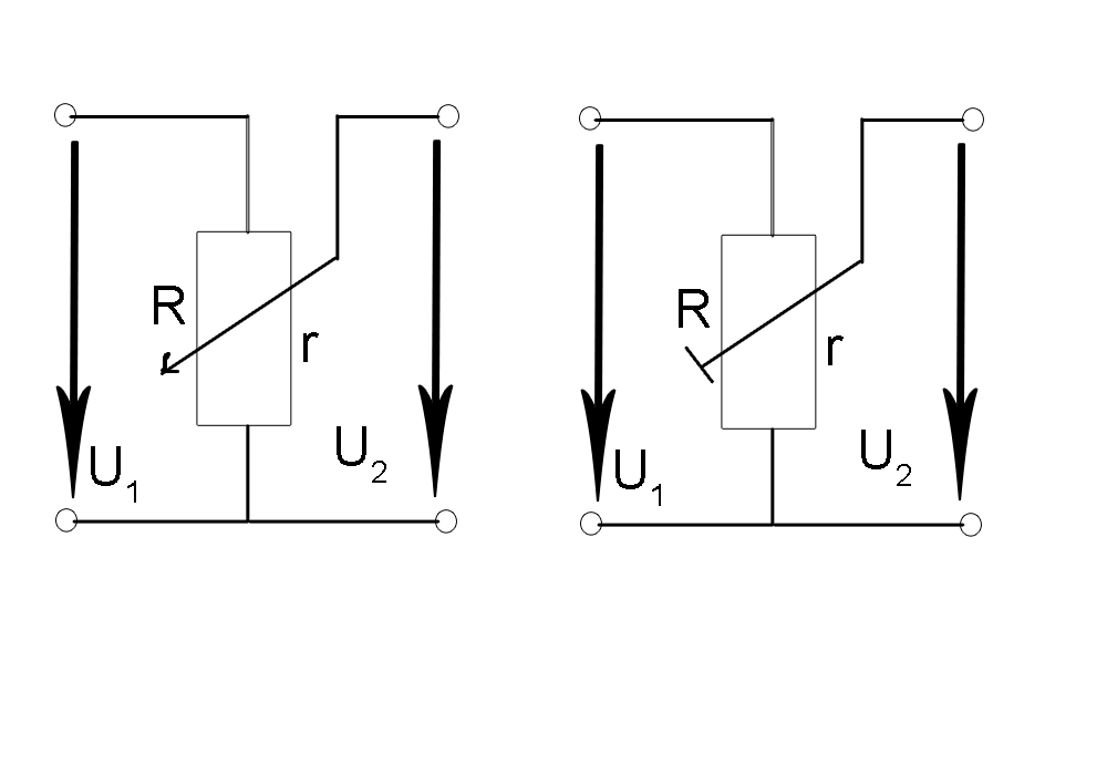 schema zapojenia potenciometra a trimra